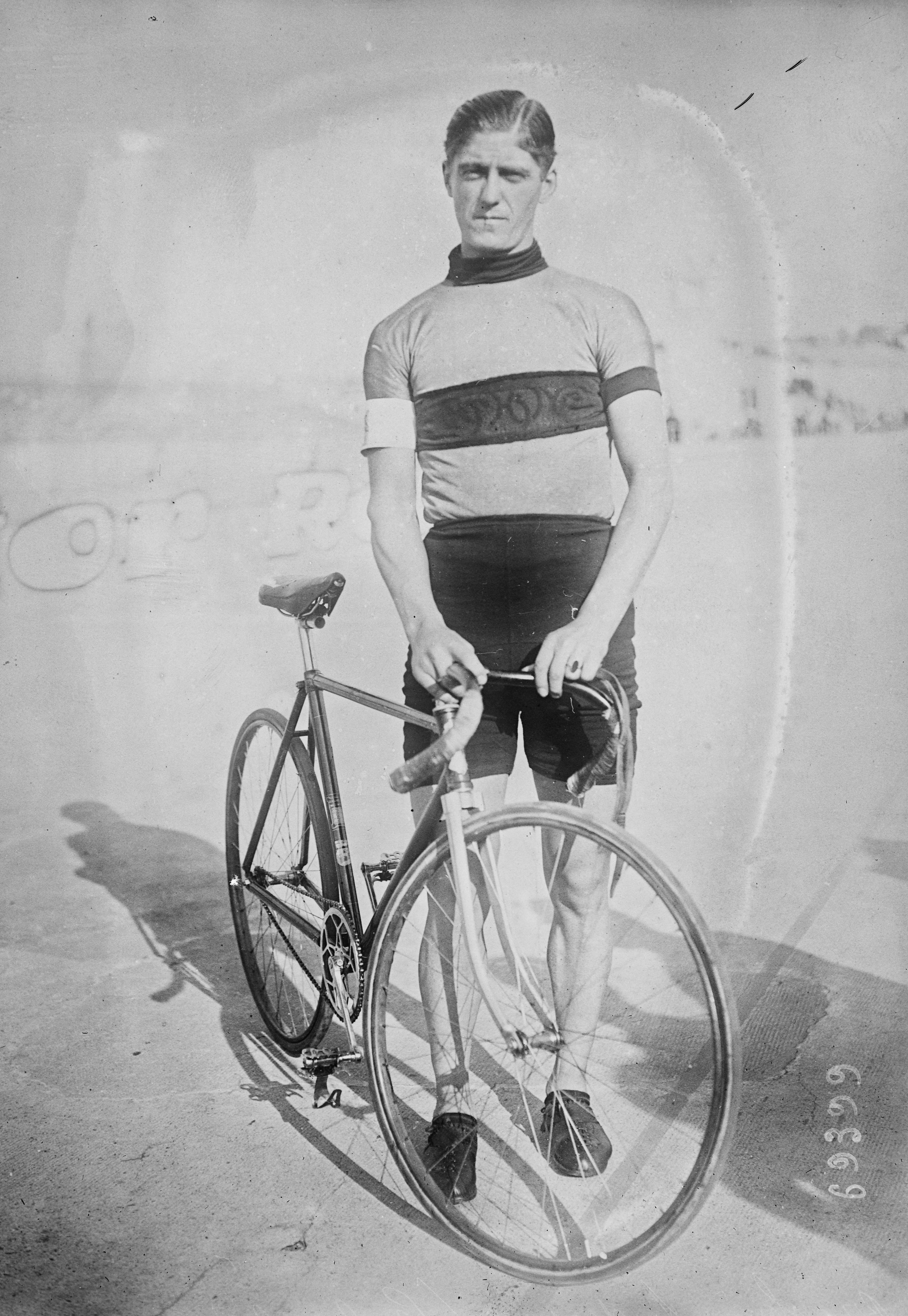 [Portrait du cycliste danois] Braski Anderson [i. e. Henry Brask Andersen] (Gerlach) : [photographie de presse] / [Agence Rol]